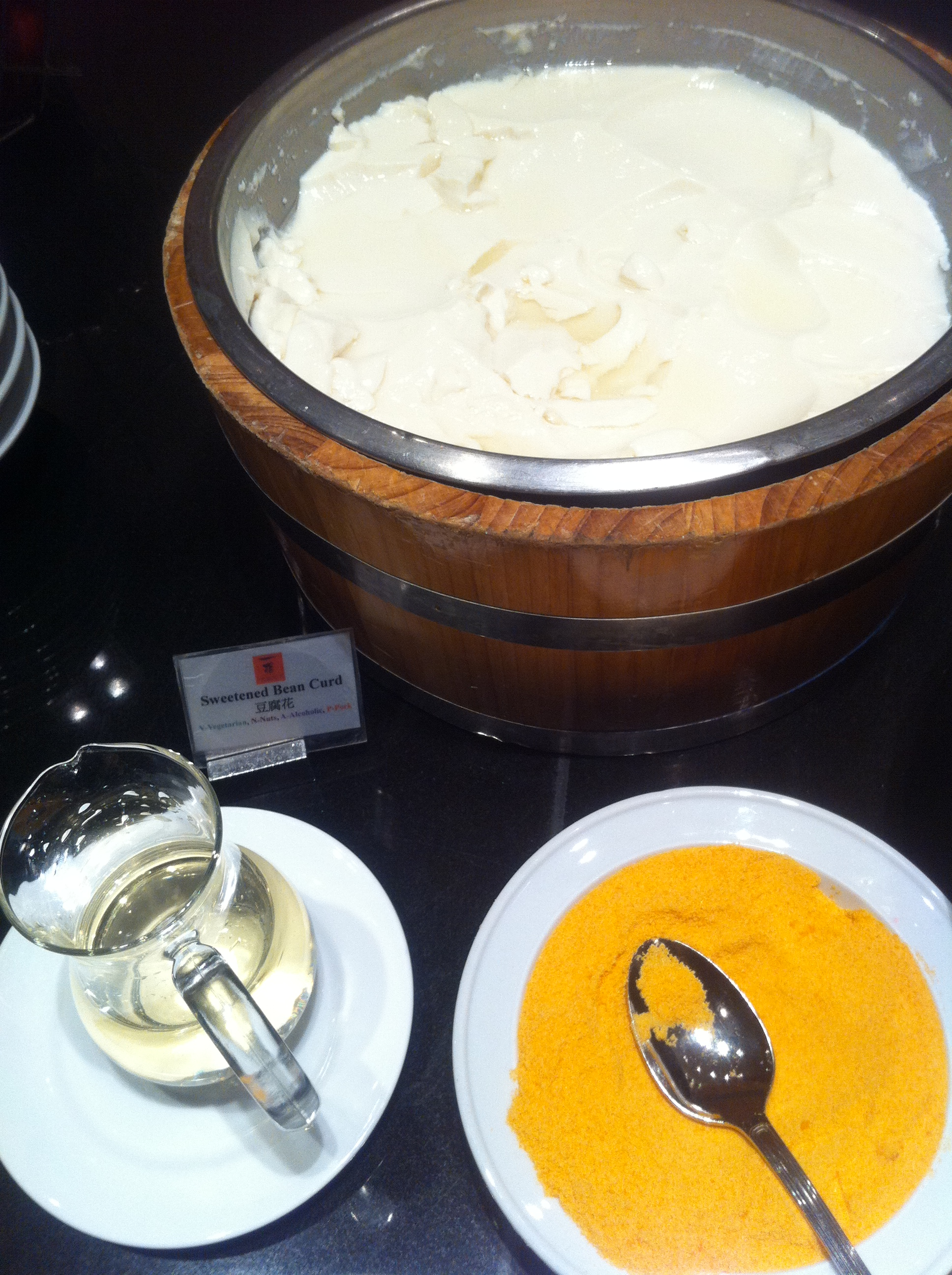 中文（香港）: 香港怡東酒店 自助餐 豆腐花